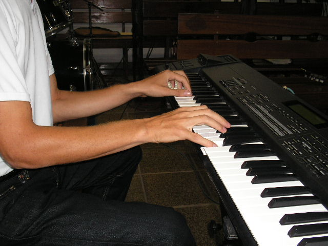 Fotografia de um tecladista profissional, tocando harmonicamente assim o instrumento